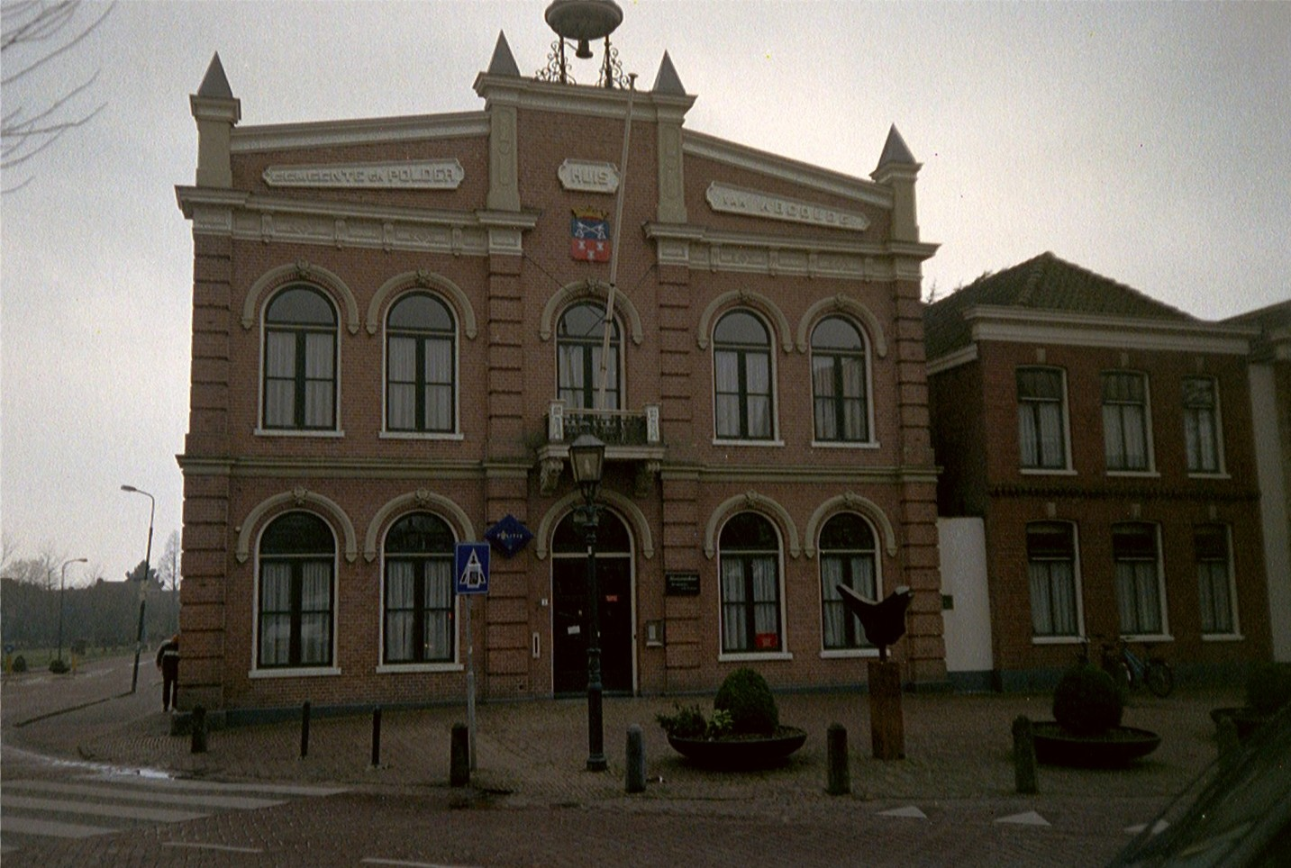 Gemeentehuis annex politiebureau Abcoude, Raadhuisplein 3. Foto genomen op 6 maart 2004 en geupload door maker.